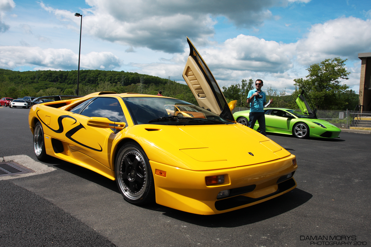 2010 Spring Bullfest.